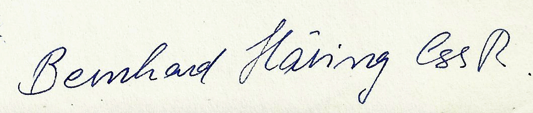 Bernhard Häring: Signatur eines handgeschriebenen Briefes vom 28. 2.1963 an meine Mutter Maria Wewel zu ihrem 60. Geburtstag.